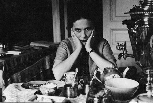 Лиля Брик в квартире в Гендриковом переулке. Конец 1920-х годов